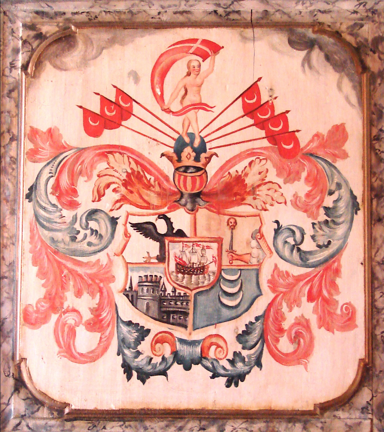 Adelers våben fra Solum Kirke, Telemark